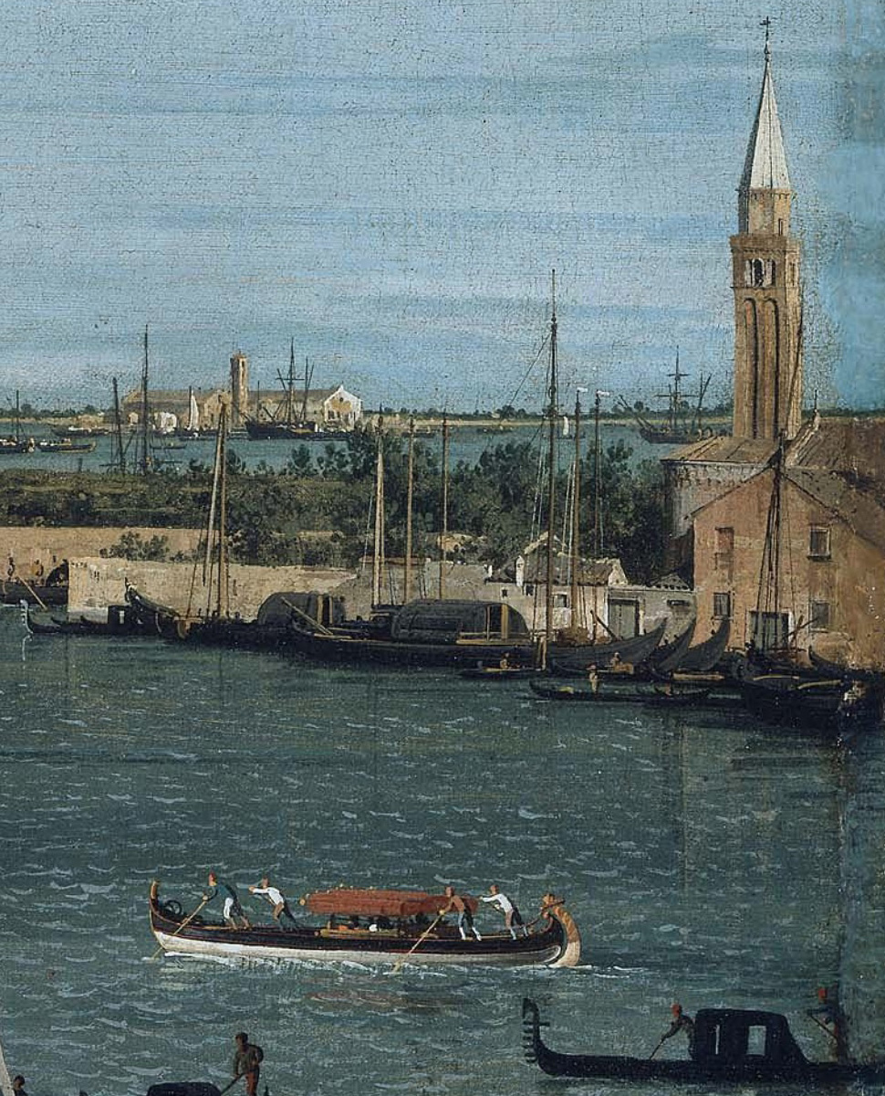 Particolare della chiesa di San Giovanni dal Bacino di San Marco di Canaletto al Museum of Fine Arts, Boston